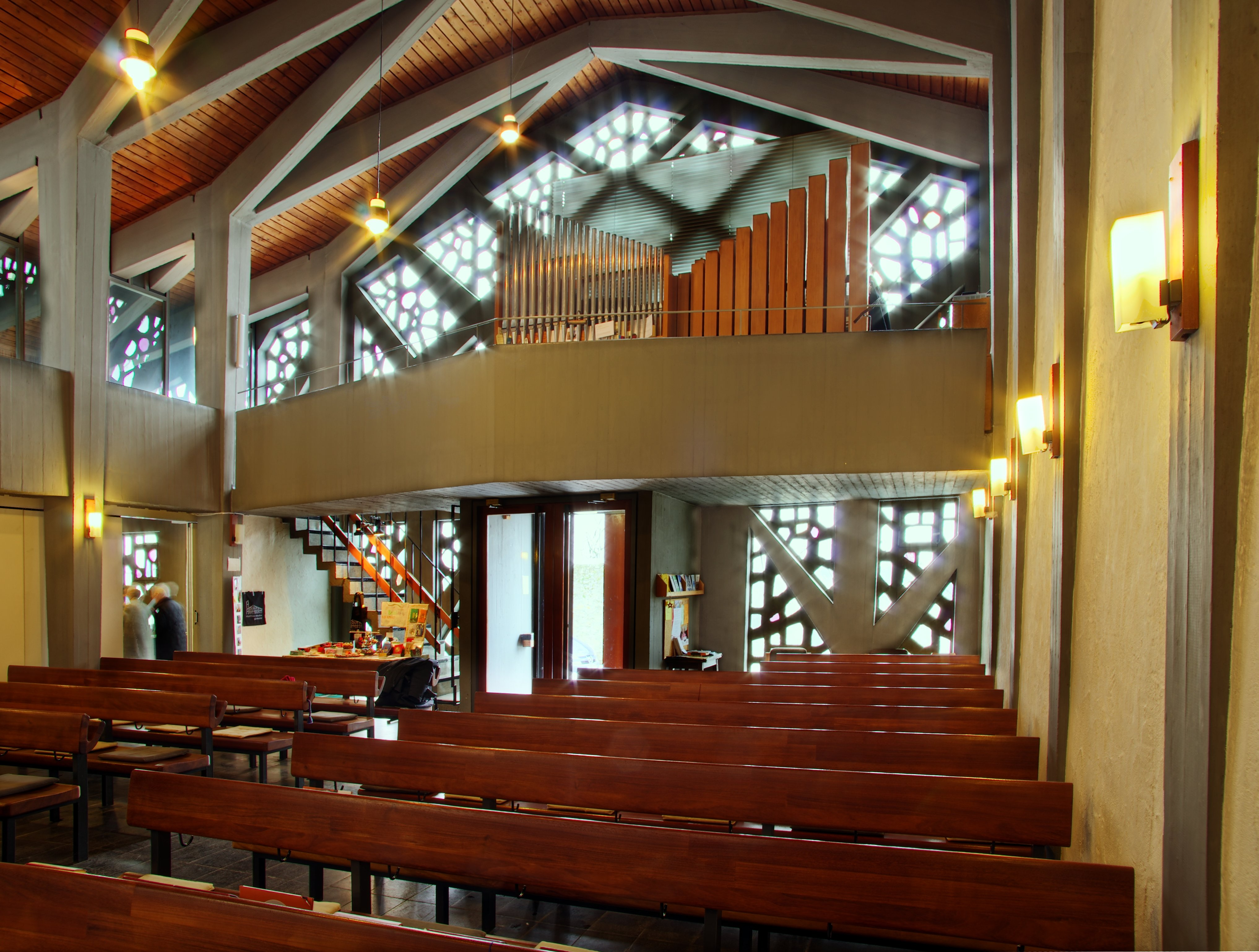 Matthias-Claudius-Kirche Blick in Richtung Eingang